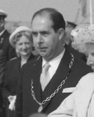 Hare Majesteit bij Europoort, baggerwerkzaamheden Rozenburg. Links van koningin Juliana staat J.C. Aschoff, de burgemeester van Rozenburg